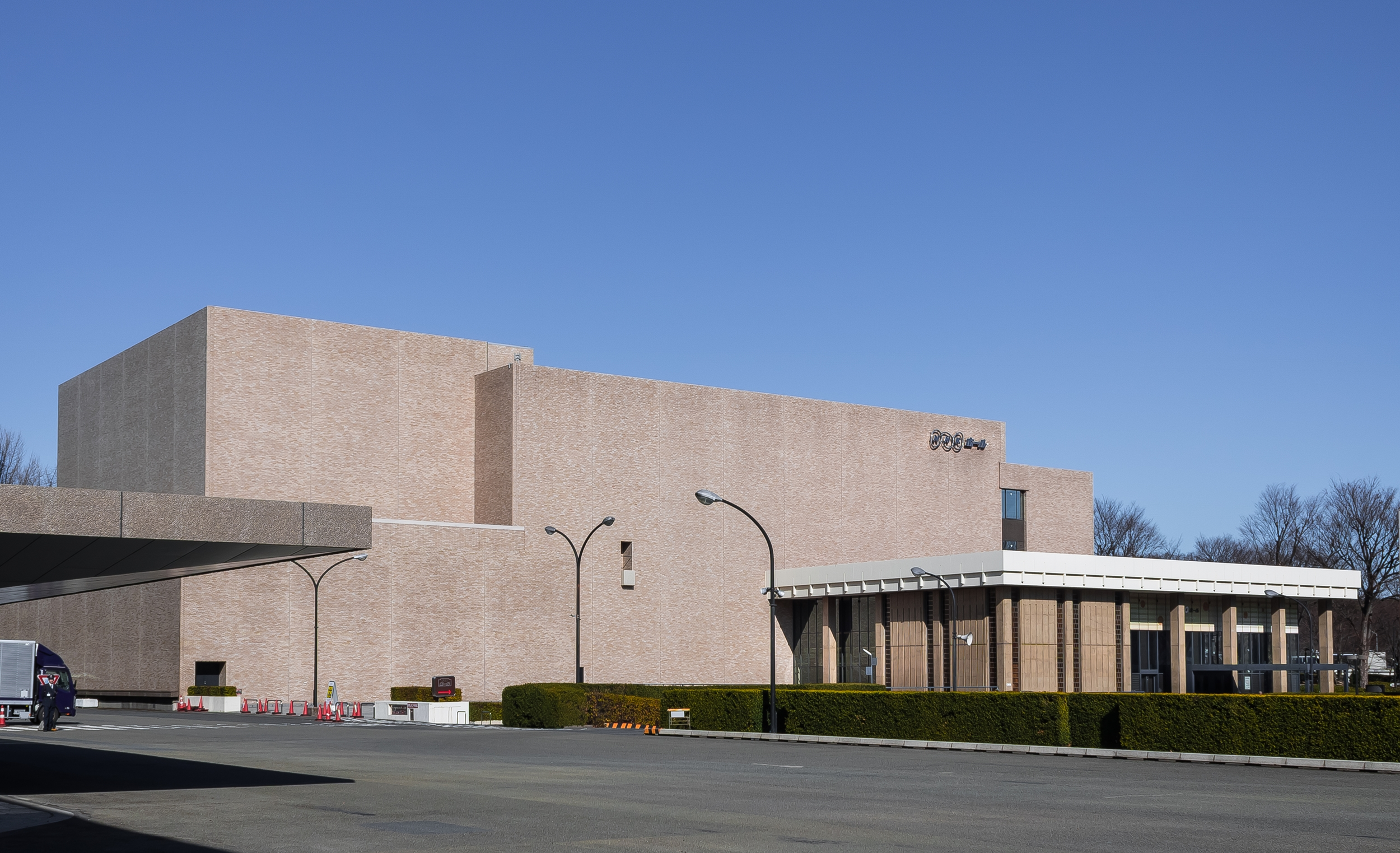 NHKホール